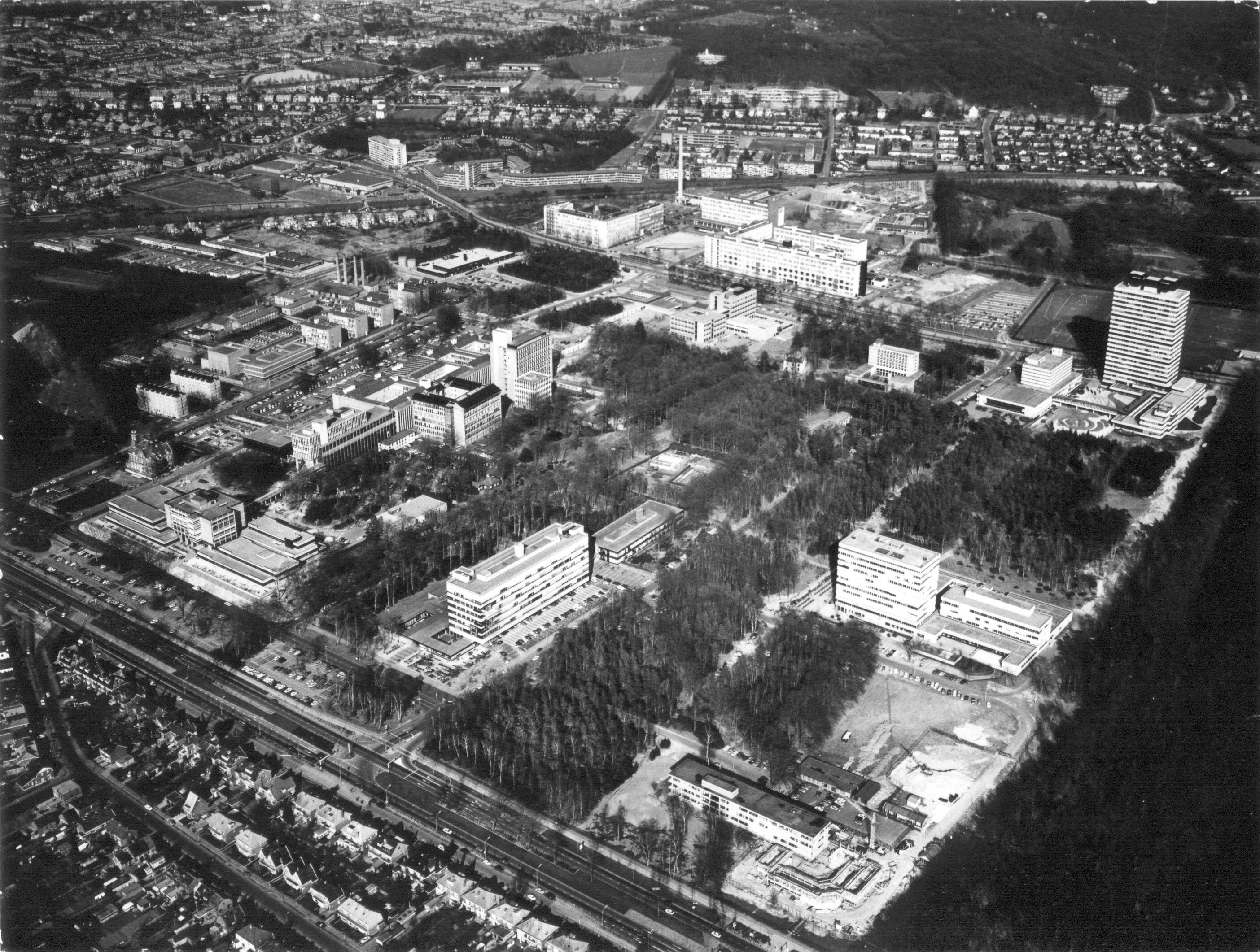 Luchtfoto van de Medische Faculteit van de Rooms Katholieke Universiteit. Linksonder een stukje Van Peltlaan en daarboven de St. Annastraat. Links in het midden Huize Heijendaal en het Radboud-Ziekenhuis. Bovenin v.l.n.r. de spoorlijn richting Venlo.